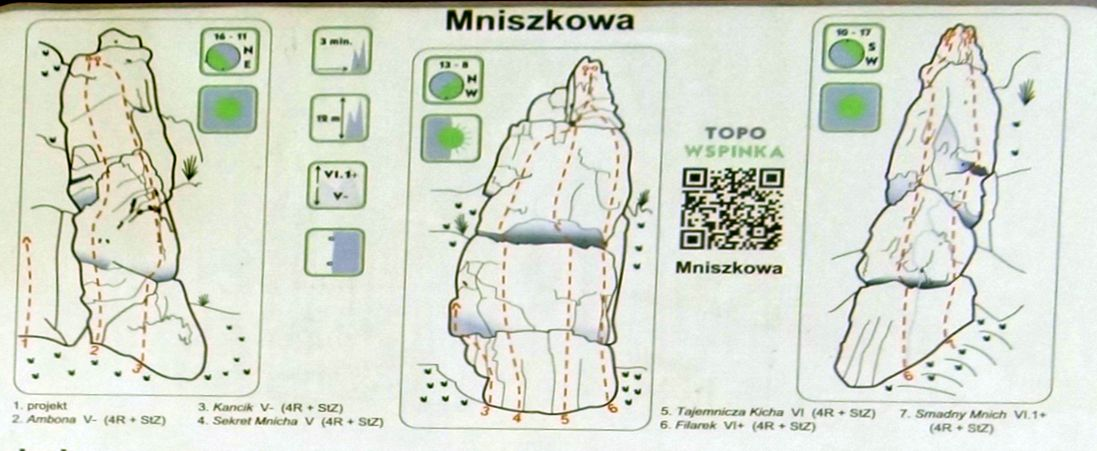 Mniszkowa w Grupie Łabajowej w Dolinie Będkowskiej